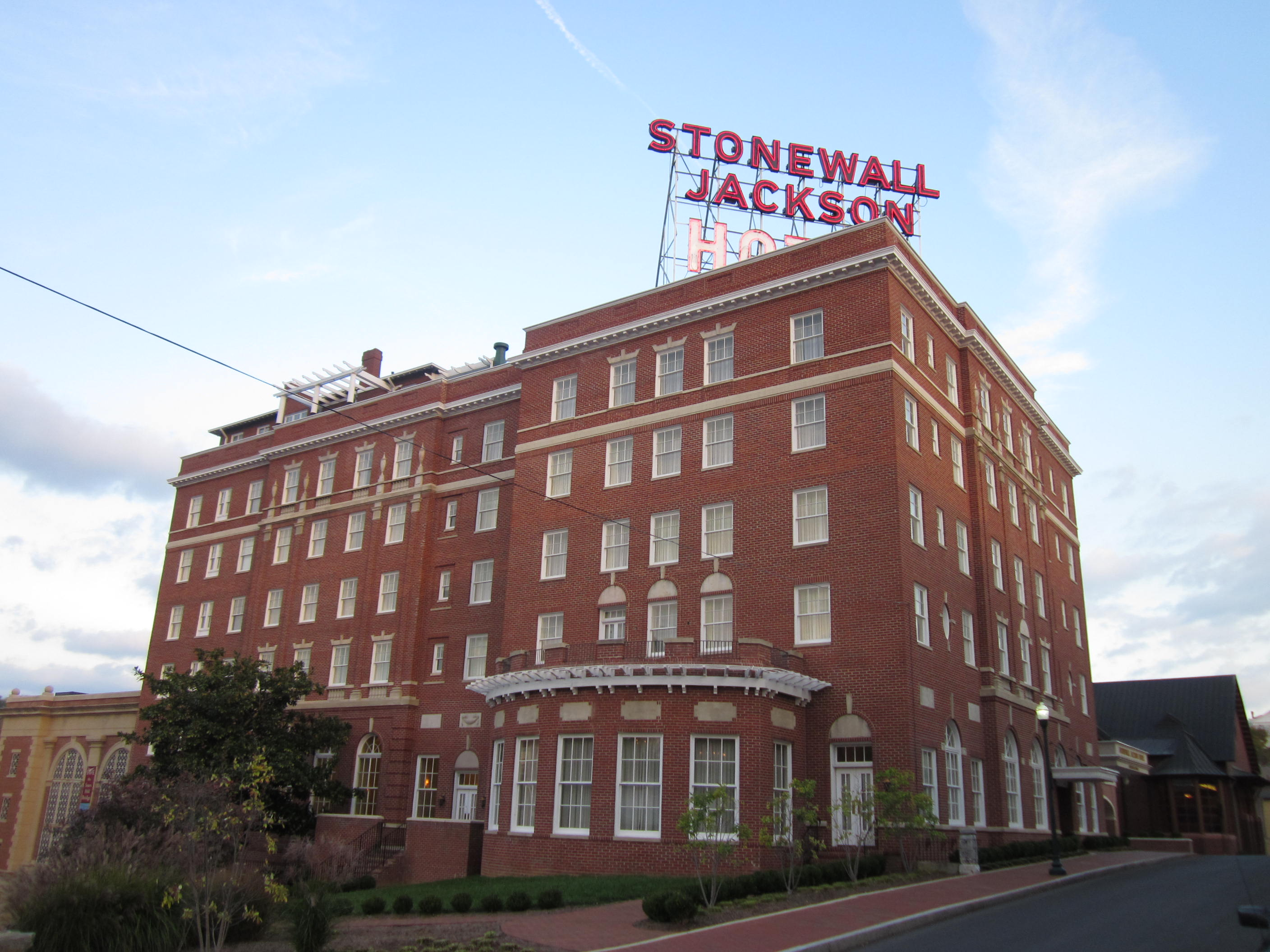 Staunton, Virginia